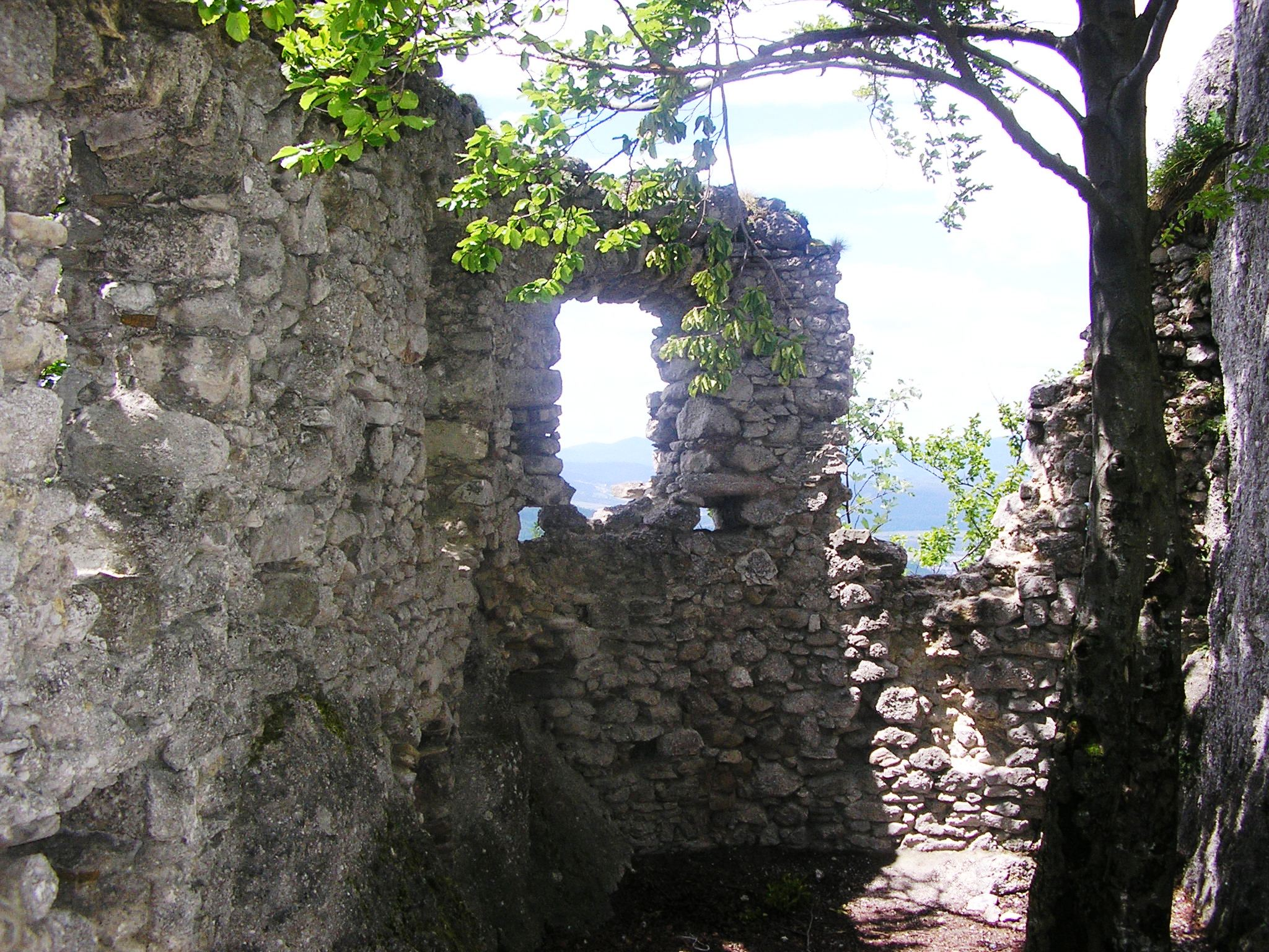 Súlovský hrad